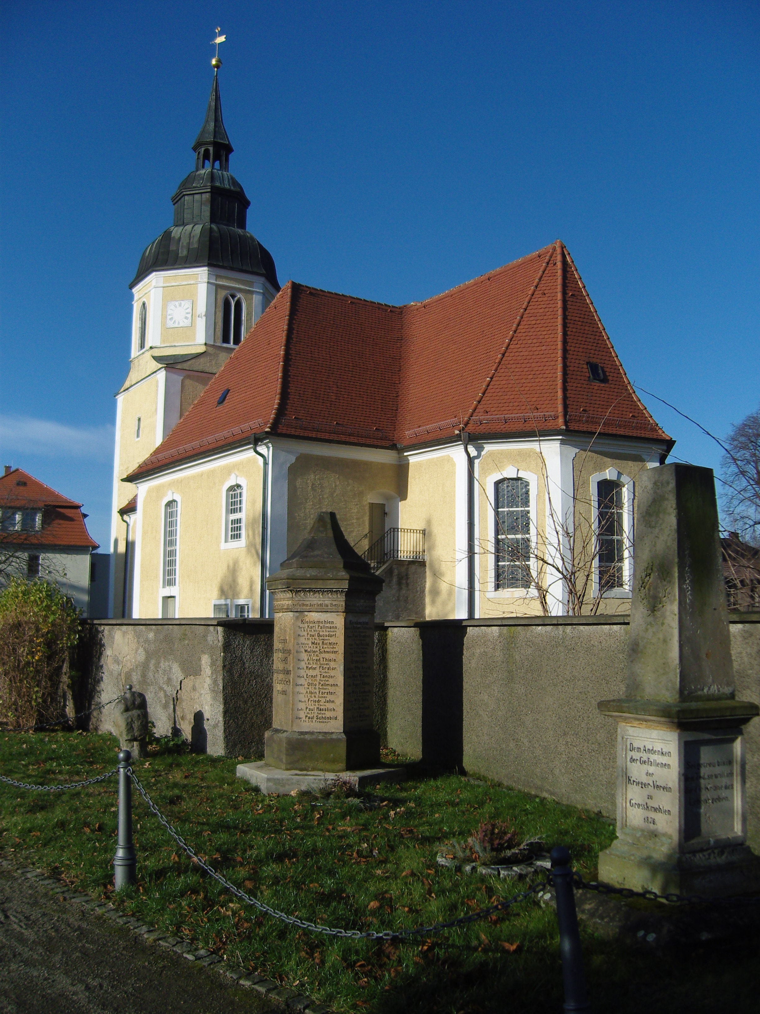 St. Georgkirche in Großkmehlen, im Vordergrund zwei Kriegerdenkmäler für die Gefallenen des Ersten Weltkrieges und des Deutsch-Französischen Krieges sowie ein Steinkreuz